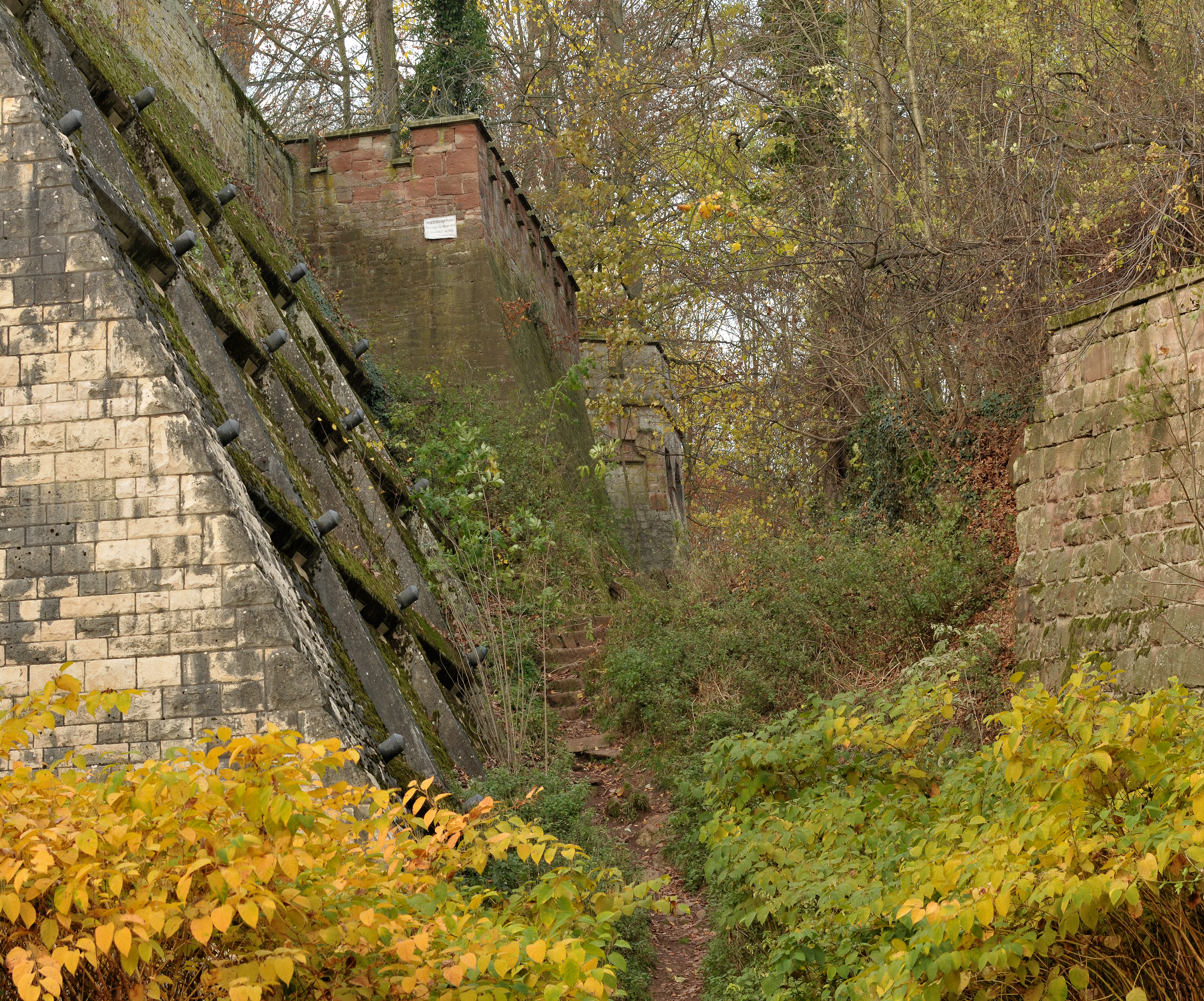 Nördlicher Teil der künstlichen Schlucht von Schloss Marienburg in der Region Hannover, Niedersachsen, Deutschland. Zum Schutz vor Korrosion wurde 1860 die linke Sandsteinwand mit einem Stützkorsett aus Betonstreben bedeckt, die mit zahlreichen gewaltigen Schrauben befestigt wurden. Die Schlucht entstand durch einen Steinbruch, in dem die Sandsteinquadern für die Umfassungsmauer der Burg gebrochen wurden.